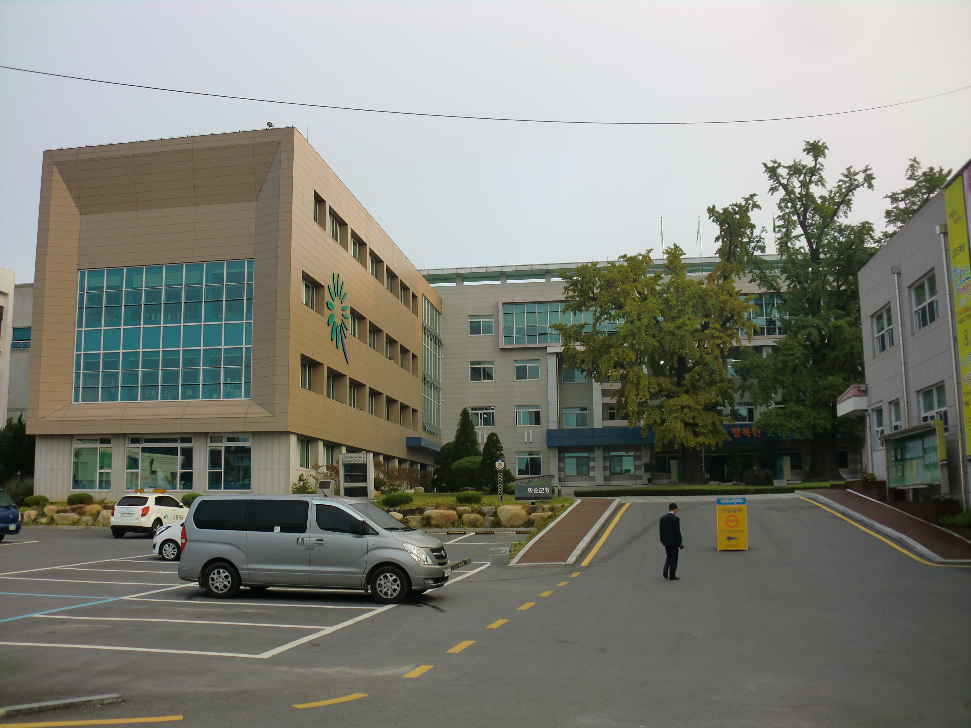 전라남도 화순군에 있는 화순군청